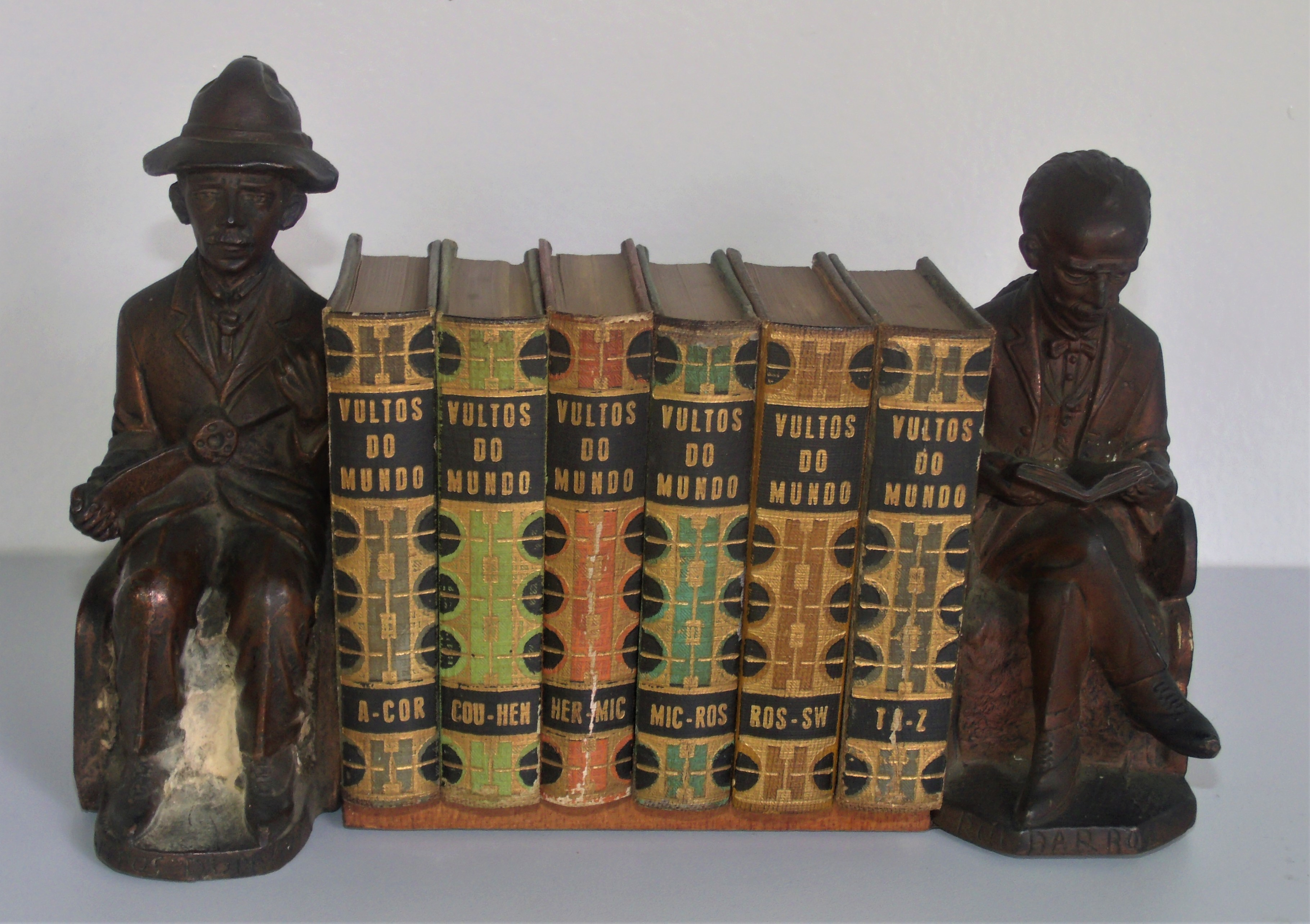 Antigo serre livre brasileiro com dicionário biográfico de mini livros com os apoios laterais de mini estátuas de Rui Barbosa e Santos Dummont.